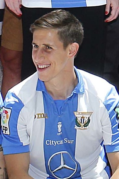 Felicidades pepineros!! Vuestro ascenso a Primera es la historia de un sueño, el resultado de vuestro trabajo y esfuerzo. Sois un orgullo para todo Madrid! Enhorabuena CD Leganés. #LeganésEsDePrimera